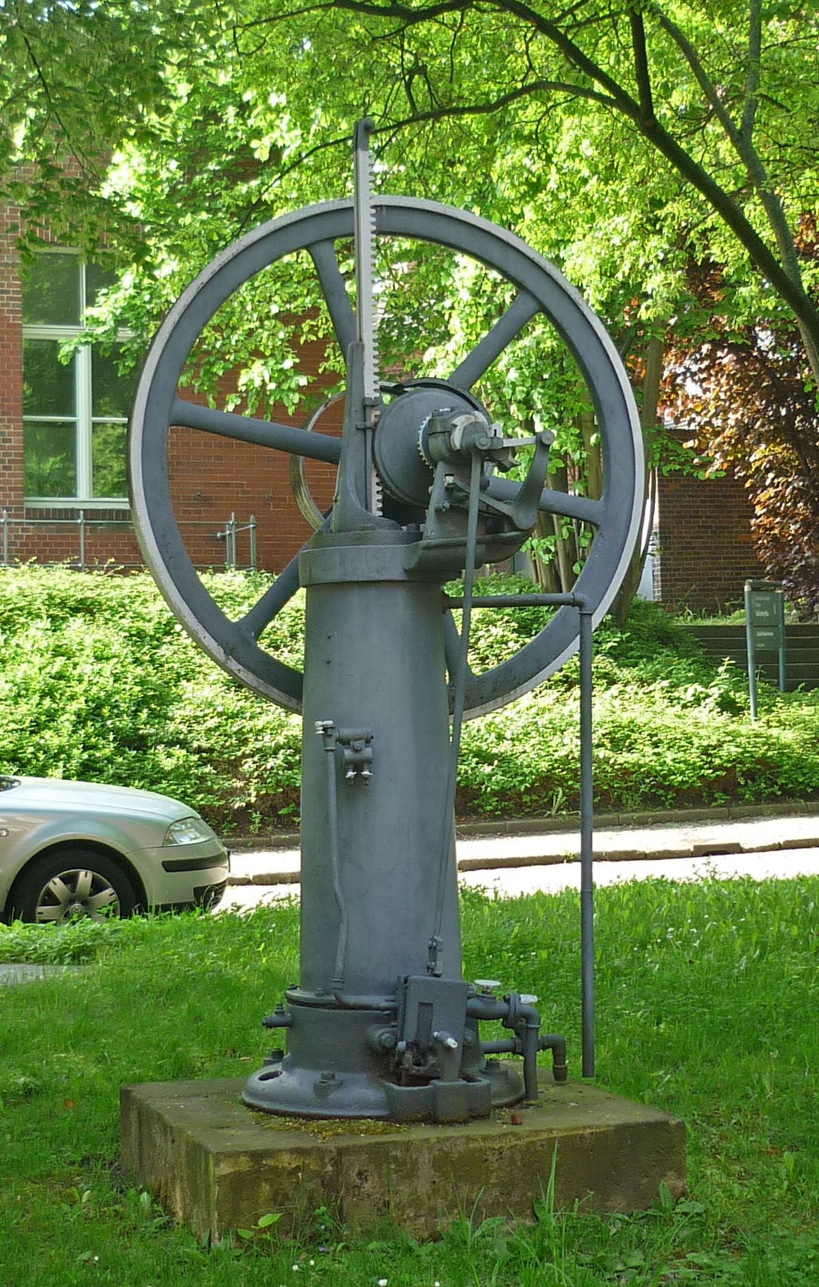 Atmosphärische Gaskraftmaschine (um 1880) hinter dem Zeuner-Bau der TU Dresden, Helmholtzstr. Als Vorläufer der heutigen Verbrennungsmotoren geht die als technisches Denkmal aufgestellte atmosphärische Gaskraftmaschine auf Nikolaus Otto (1842-1891) und Eugen Lange (1833-1895) zurück. In der Gas- und Motorenfabrik Köln-Deutz wurde die 1866 patentierte Erfindung seit 1872 in einer Stückzahl von ca. 5000 hergestellt. Die Gaskraftmaschine mit Zahnstange und Schwungrad wurde mit Leuchtgas betrieben und brachte bei einer Drehzahl von 80 bis 100 U/min eine Leistung von ca. 3 – 4 PS. Sie wurde vor allem als Antrieb im Kleingewerbe eingesetzt.